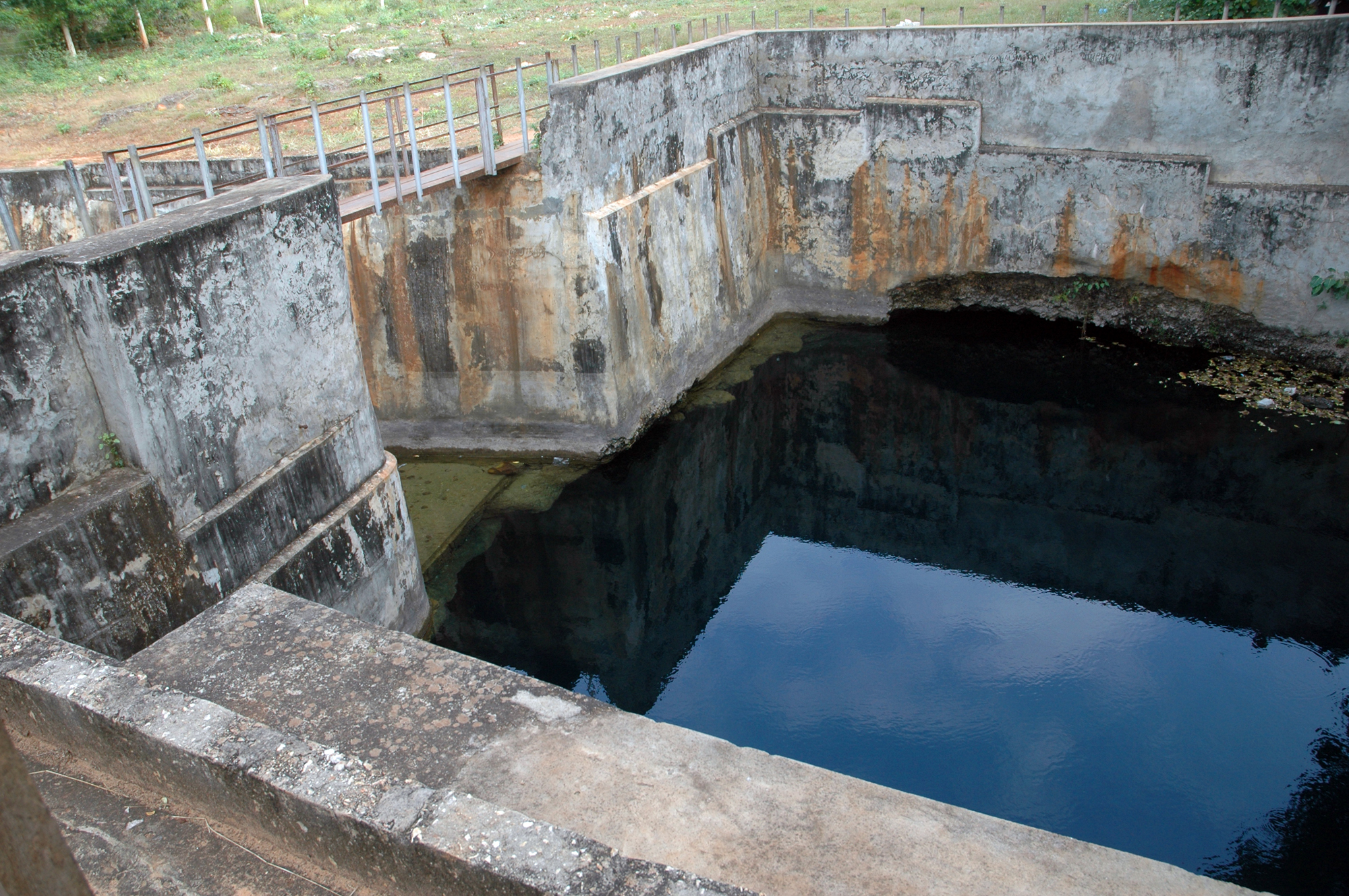 நிலாவரை